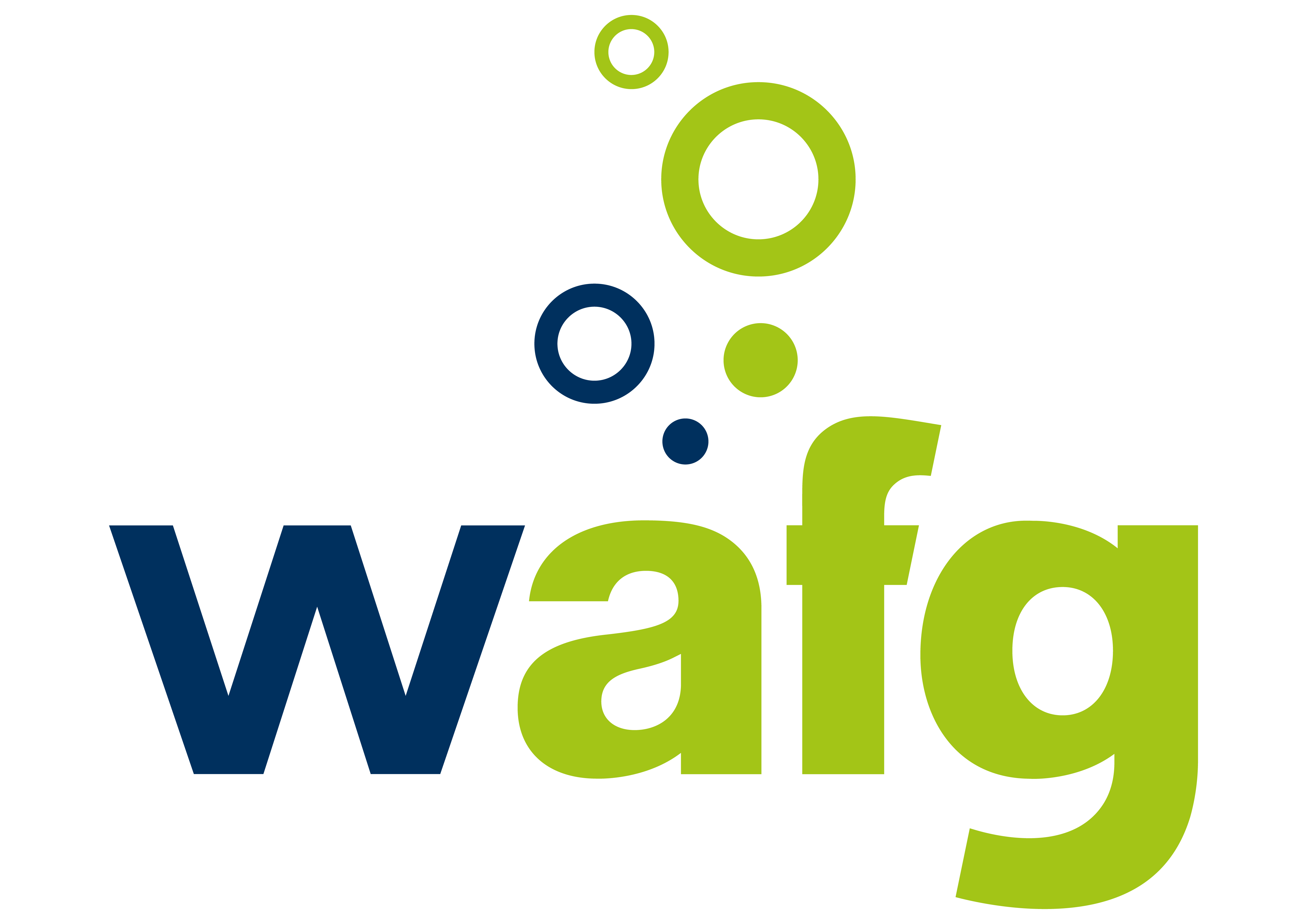 Logo der Wirtschaftsvereinigung Alkoholfreie Getränke (wafg) (seit 2019)